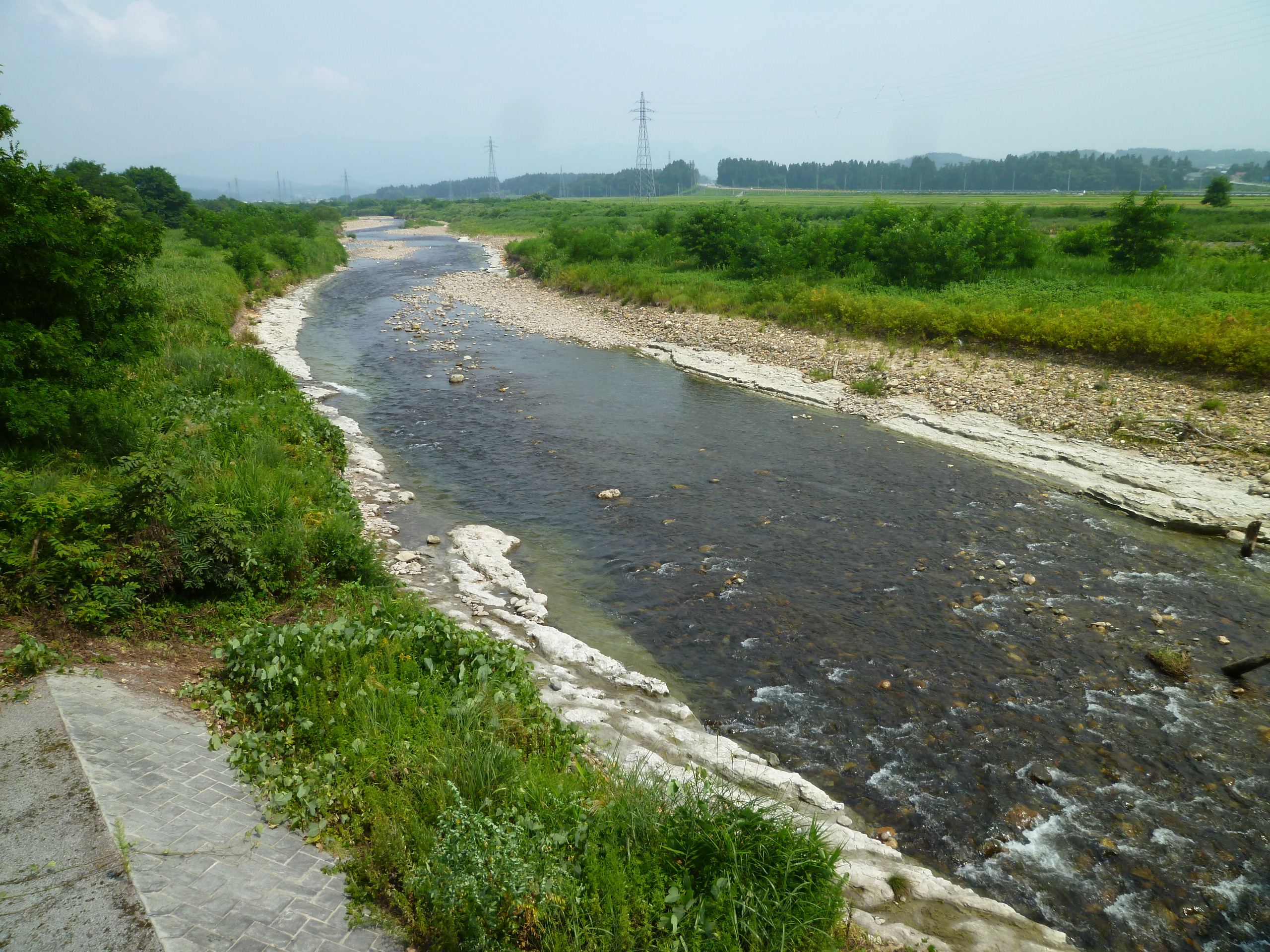 丹生川。最上川水系。山形県尾花沢市、丹生川橋より上流方向を撮影。